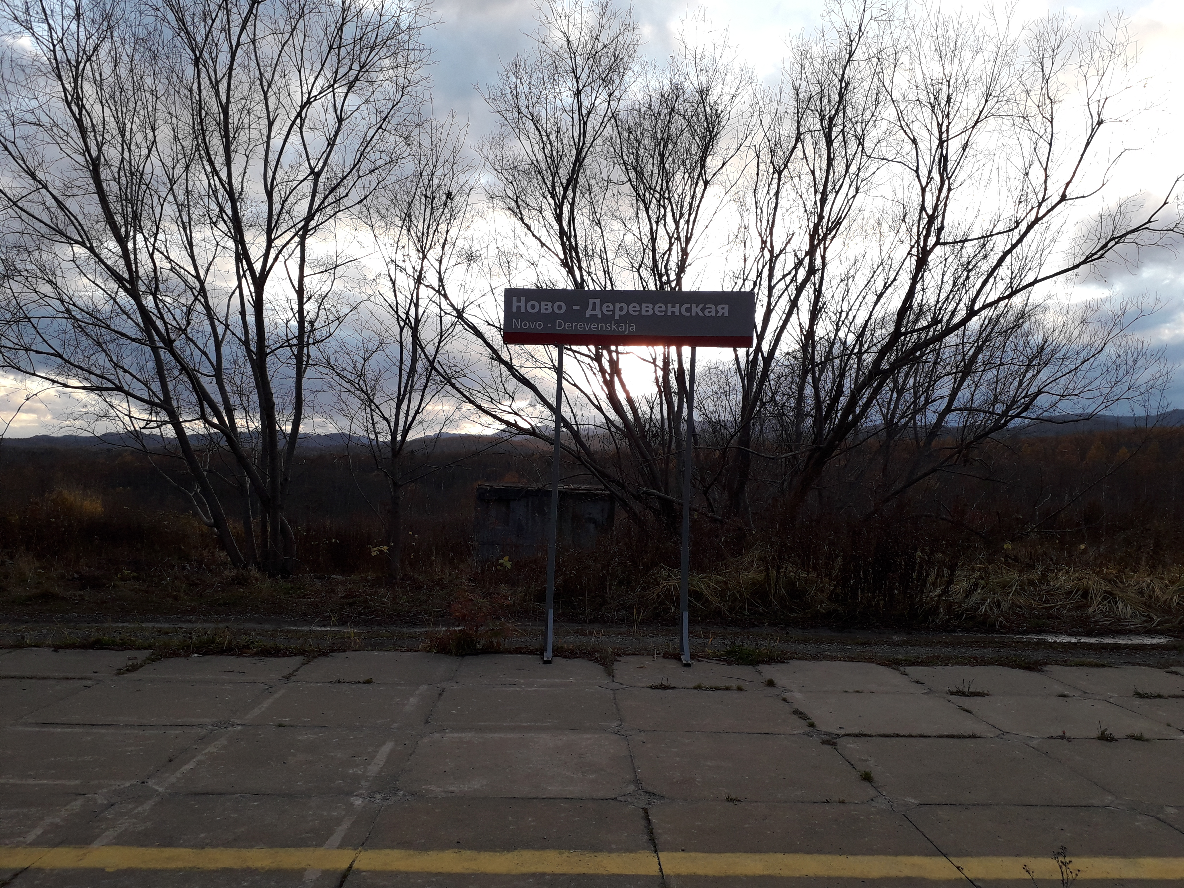 Дальневосточный регион ДВЖД станция Новодеревенская